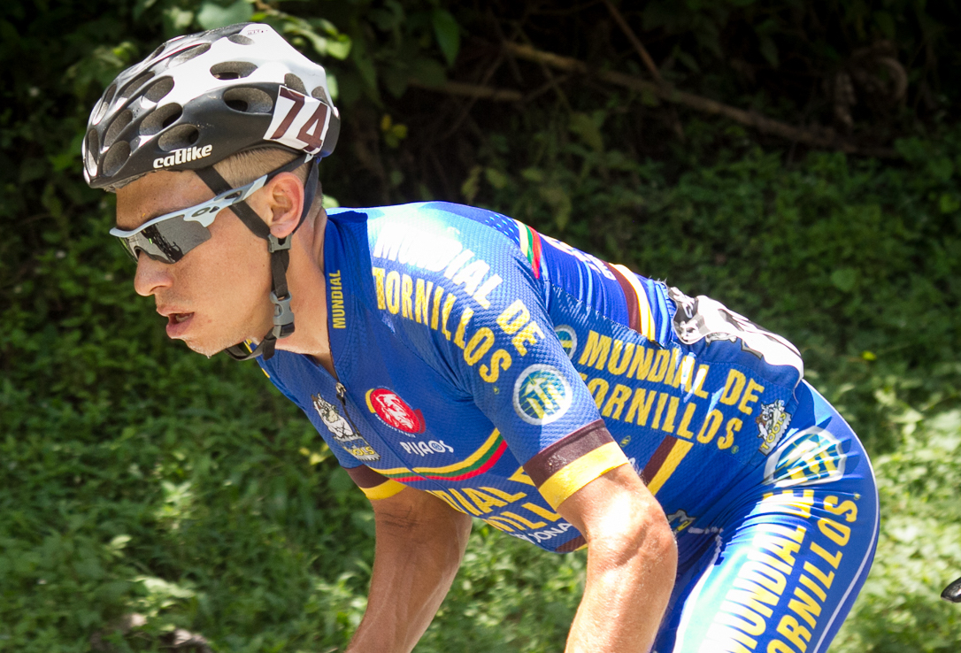 Et.3 Clásico RCN 2016 Didier Chaparro en punta.